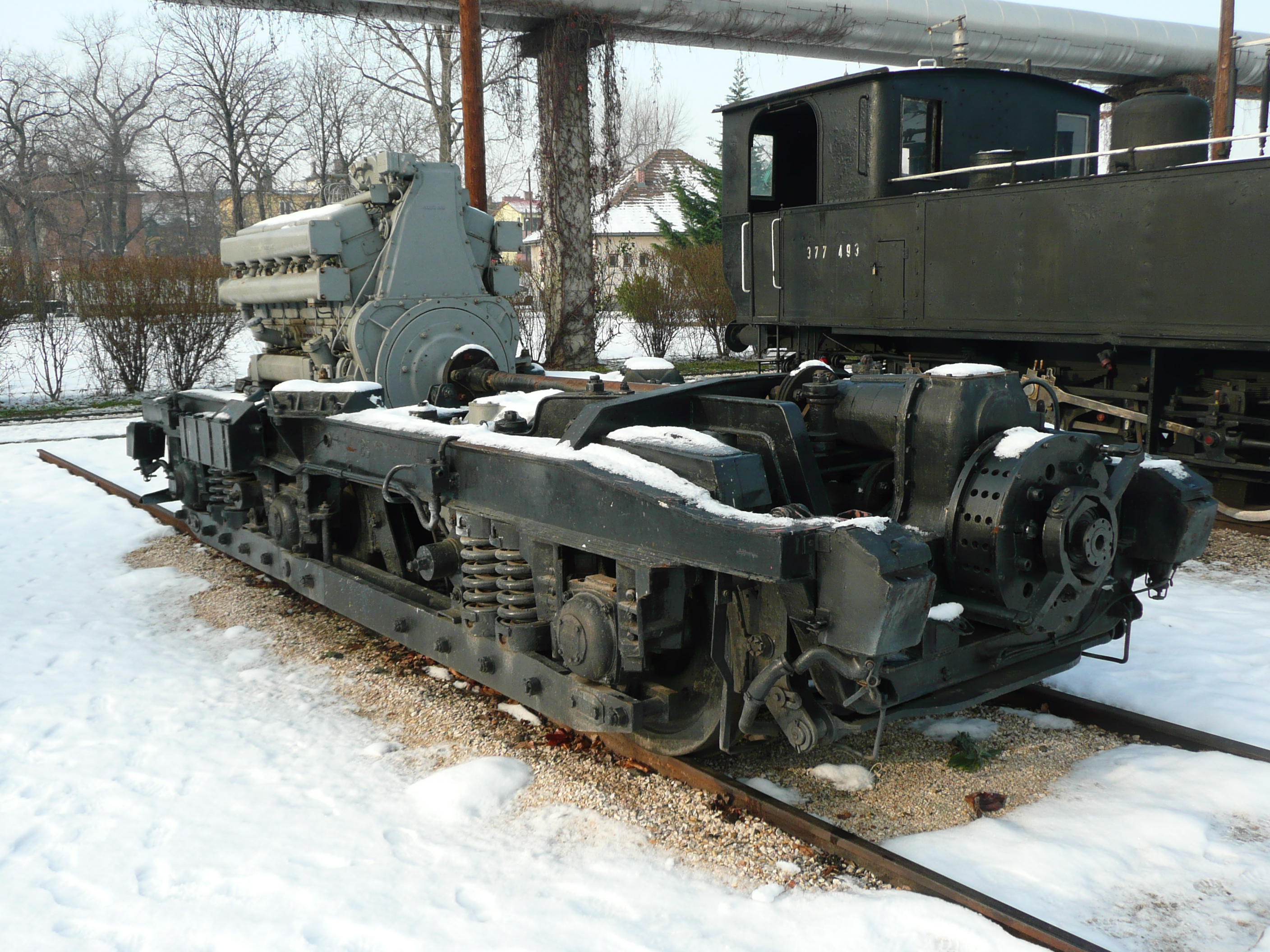 Maschinendrehgestell eines Triebwagens der Bauart Hargita von Ganz & Cie im Bahnpark Budapest